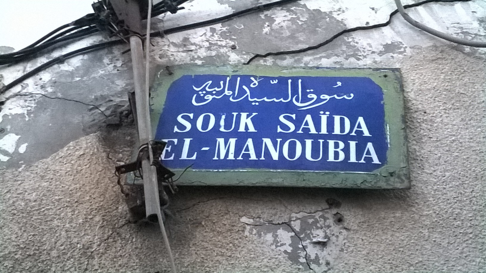 Sidi El Béchir , Tunis سيدي البشير ، تونس